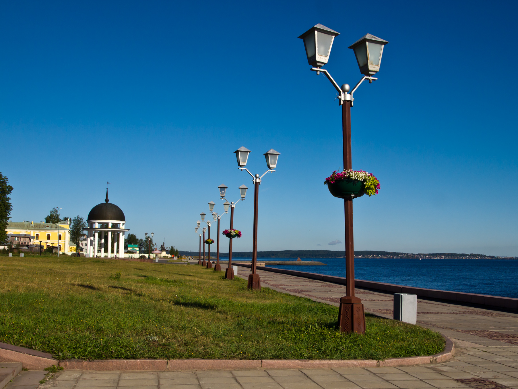 Онежская набережная (Советская площадь)